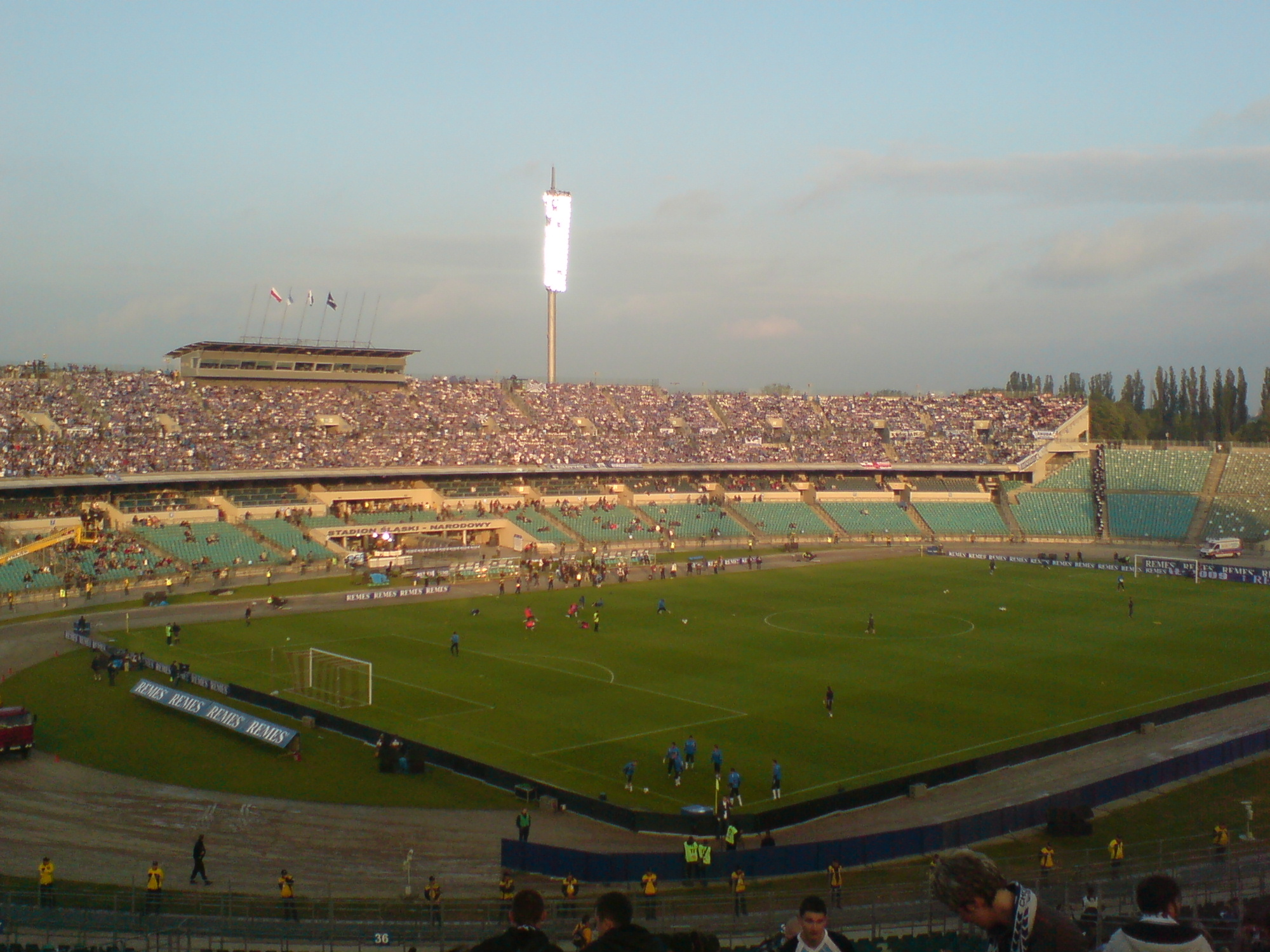 Finał Pucharu Polski 2009 na Stadionie Śląskim w Chorzowie Ruch Chorzów – Lech Poznań 0:1 (0:0) – przed meczem. Piętrowa trybuna wypełniona kibicami Lecha Poznań.